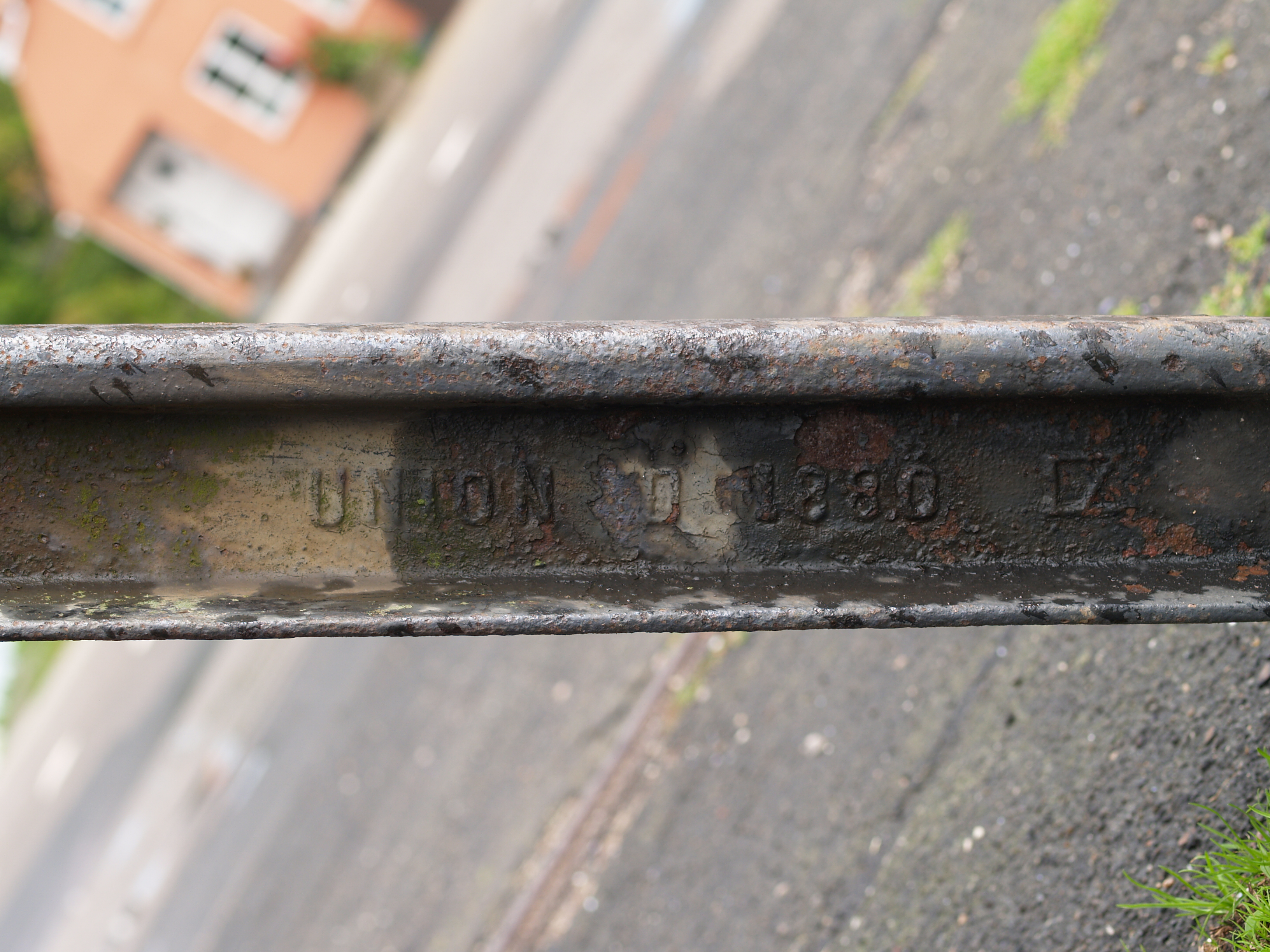 Schiene an einem Prellbock am Hafen von Sonderburg in dk aus dem Jahr 1880, Hersteller Union D(Union Dortmund)